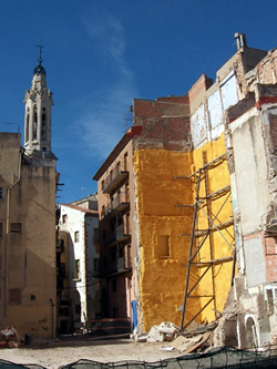 Estat de les obres del nou Museu del Mòn Casteller de Valls, vistes des del Carrer d'Espardenyers de Valls, fotografía feta el dia 24 d'Octubre de 2.014, mentre avencen, molt lentament, les obres de demolició